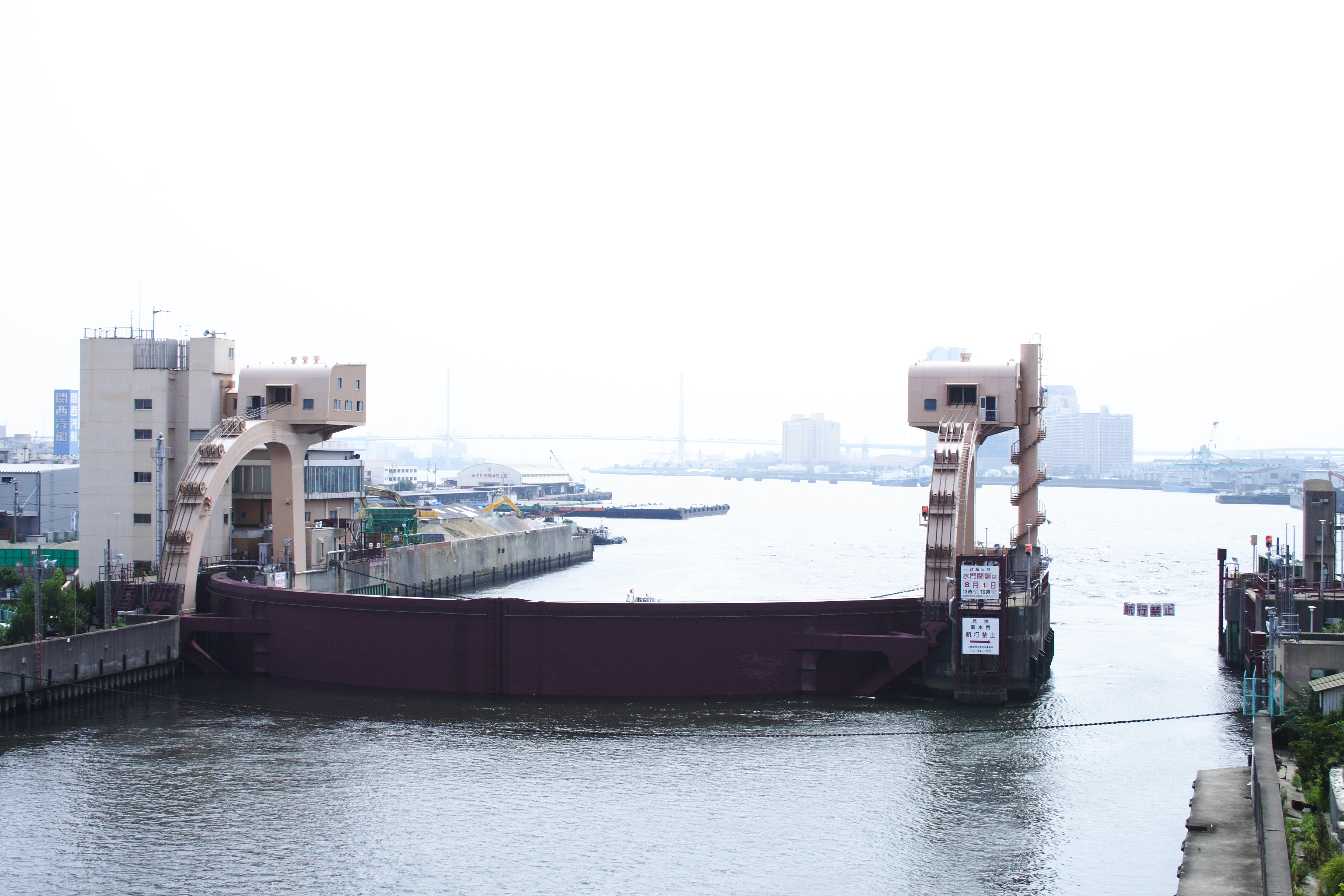 Ajigawa Suimon Gates/ 安治川水門